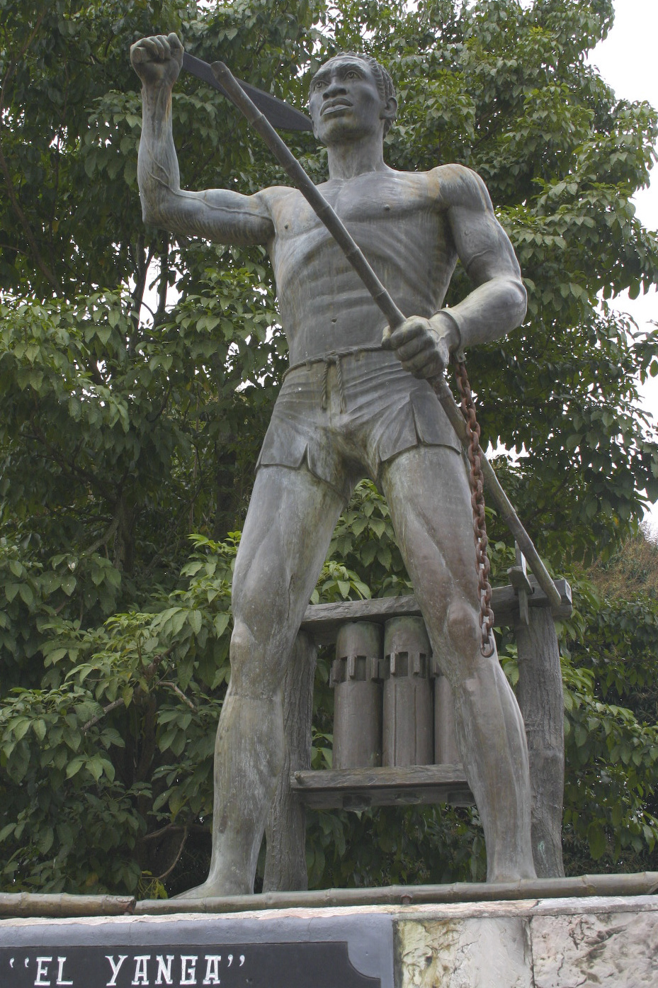 Gaspar Yanga, el libertador de Yanga, el Primer pueblo libre de América.